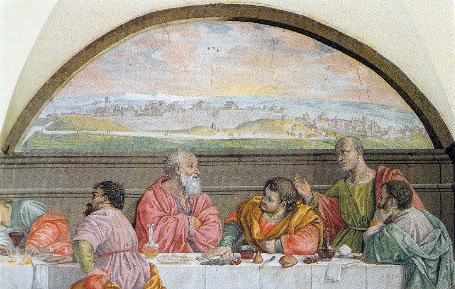 Ultima Cena (particolare), Convento della Croce - San Casciano in Val di Pesa